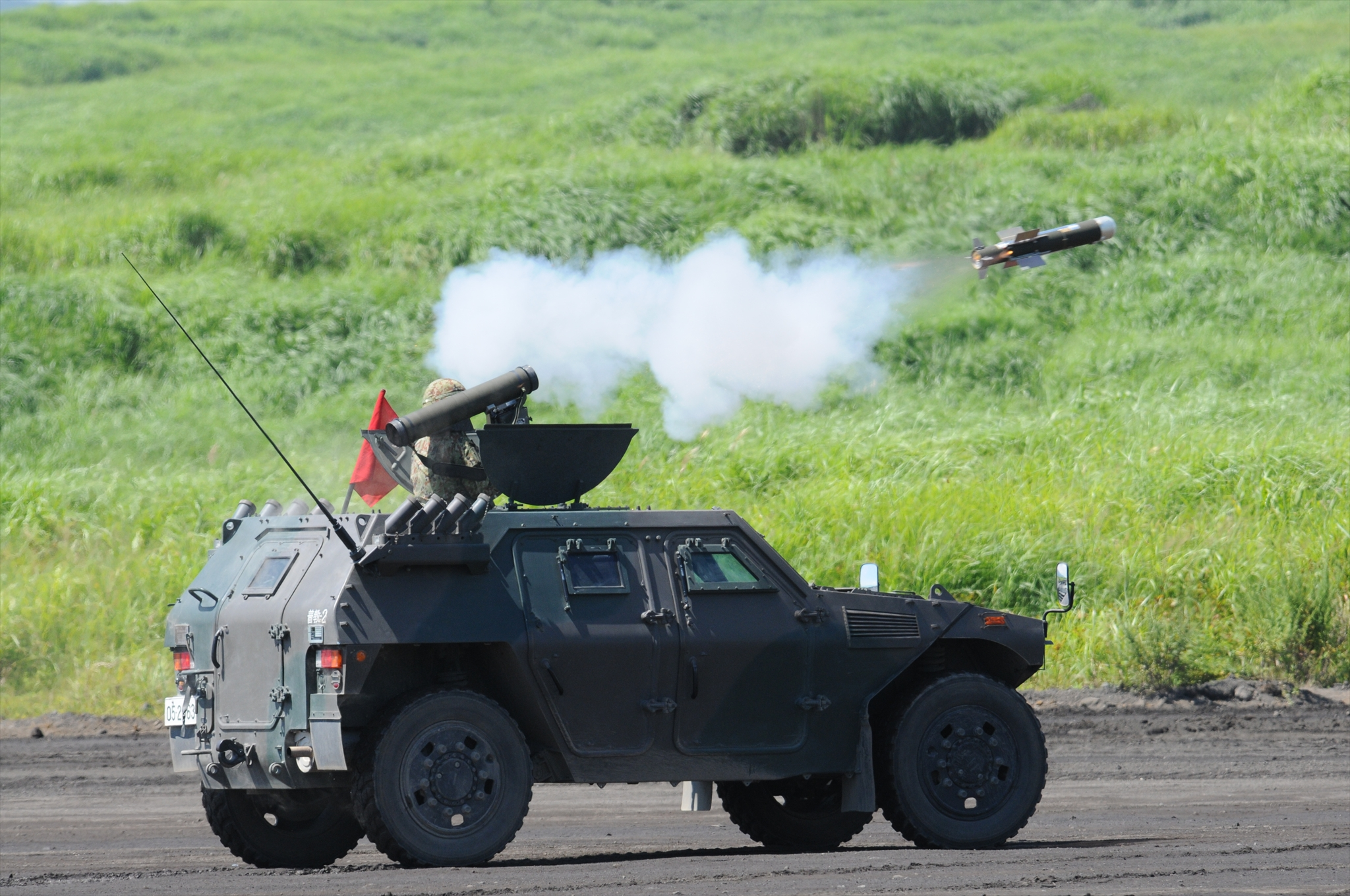 01式軽対戦車誘導弾の射撃の様子。平成24年度富士総合火力演習の第2学校予行にて。